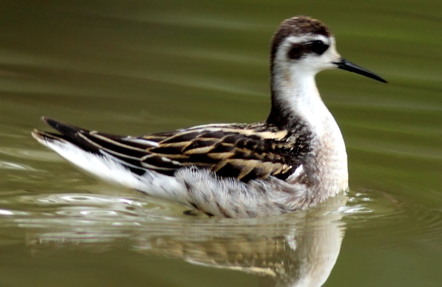 Phalarope à bec étroit que l'on peut rarement observer dans nos régions. Photo prise sur le plan d'eau du jardin public Jean Moulin à Aubagne (Bouches du Rhône), France.